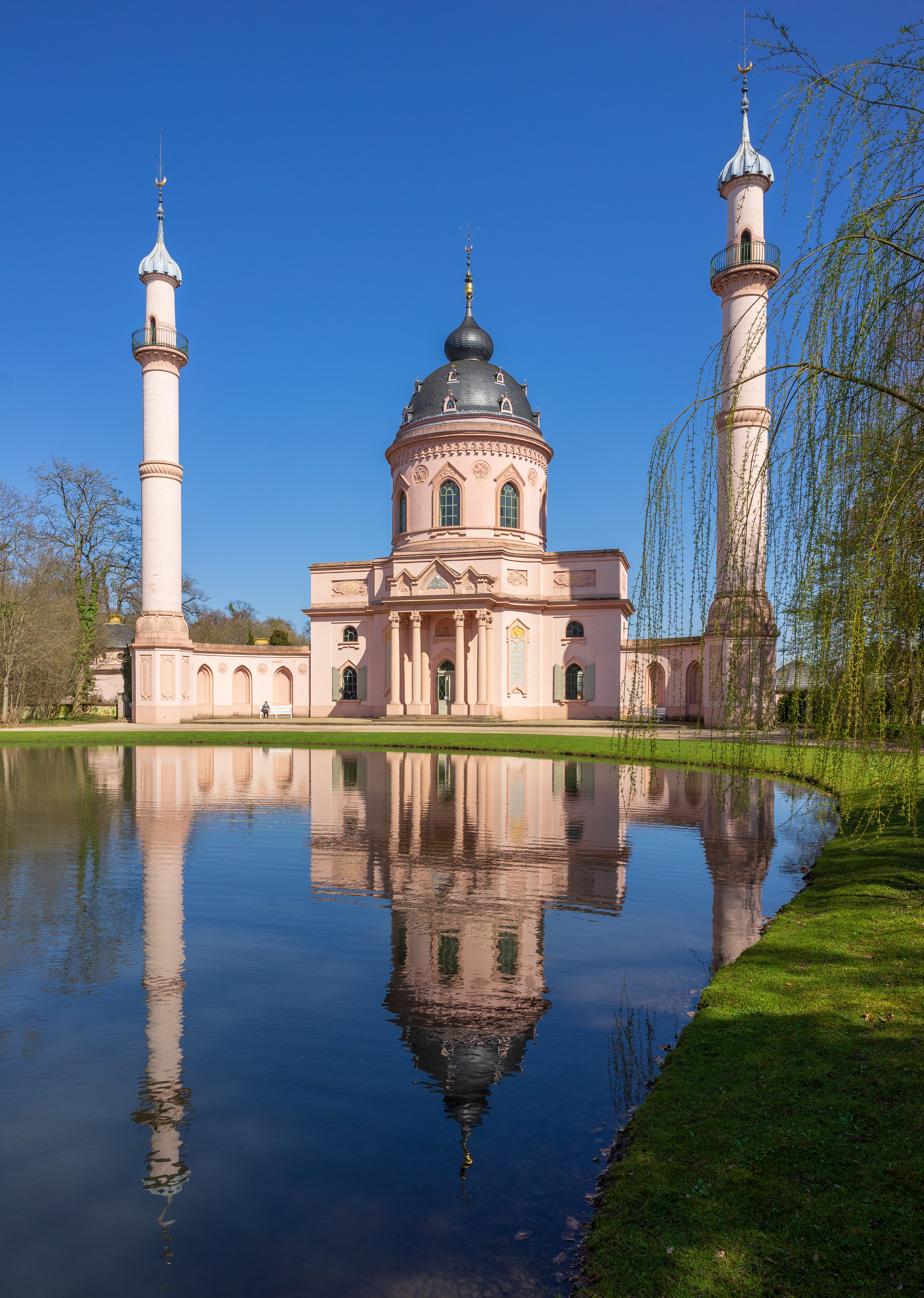 Schwetzingen, Schlossgarten: Die Westfassade der Moschee samt Spiegelung, gesehen von Südwesten über den Moscheeweiher.